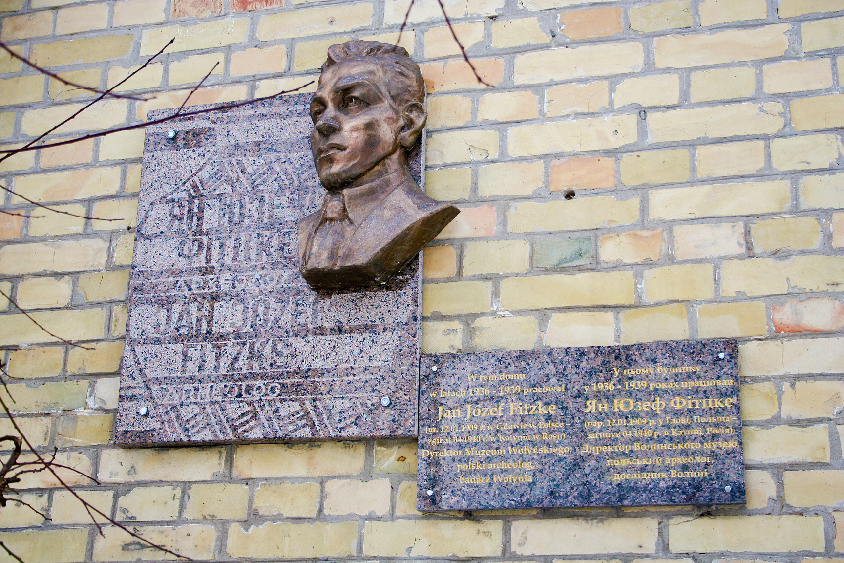 Commemorative plaque in Lutsk